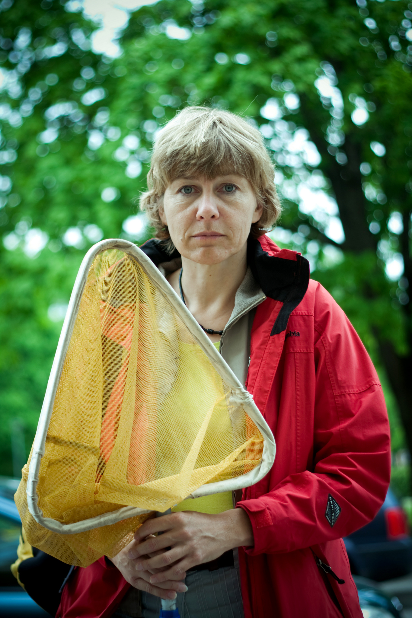 Zooloog Riinu Rannap Tartus, Vanemuise 46 ees.